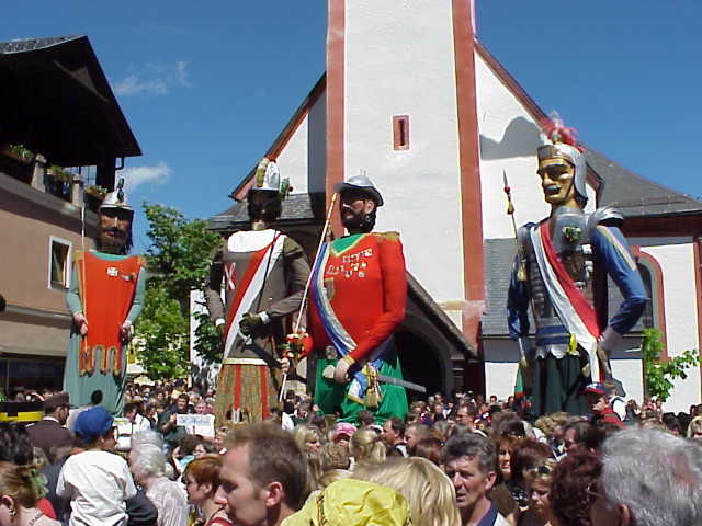 Samsontreffen in Mauterndorf: vom links nach rechts Krakaudorf, Tamsweg, Mauterndorf, Mariapfarr